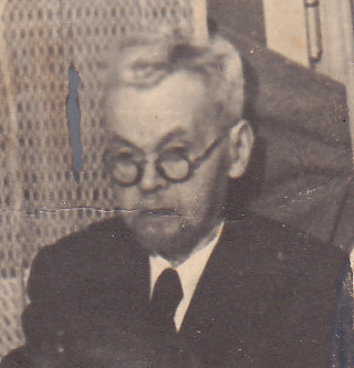 תמונתו של דר מלך זגורודסקי